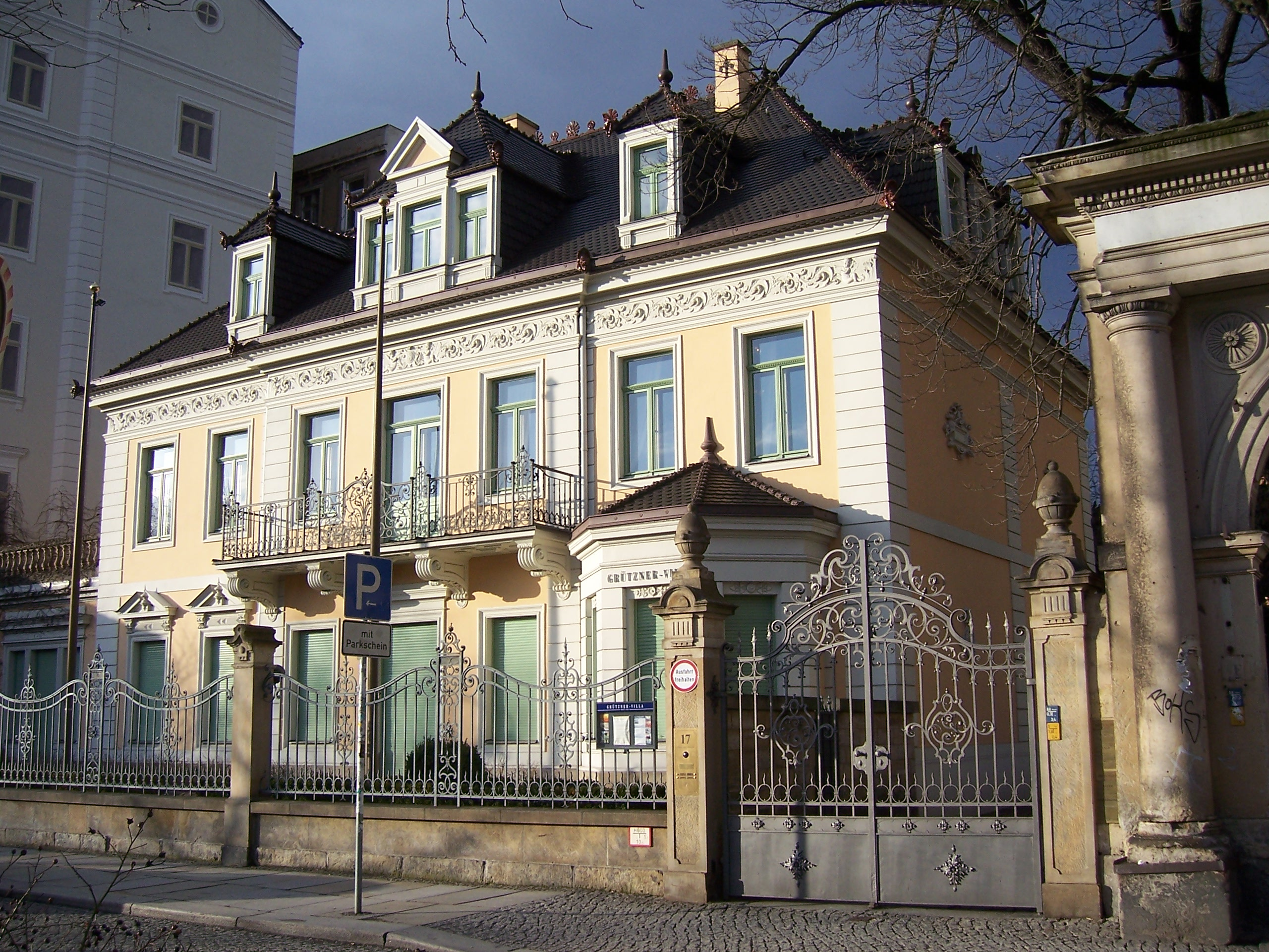 Die Grützner-Villa in der Dresdner Äußeren Neustadt